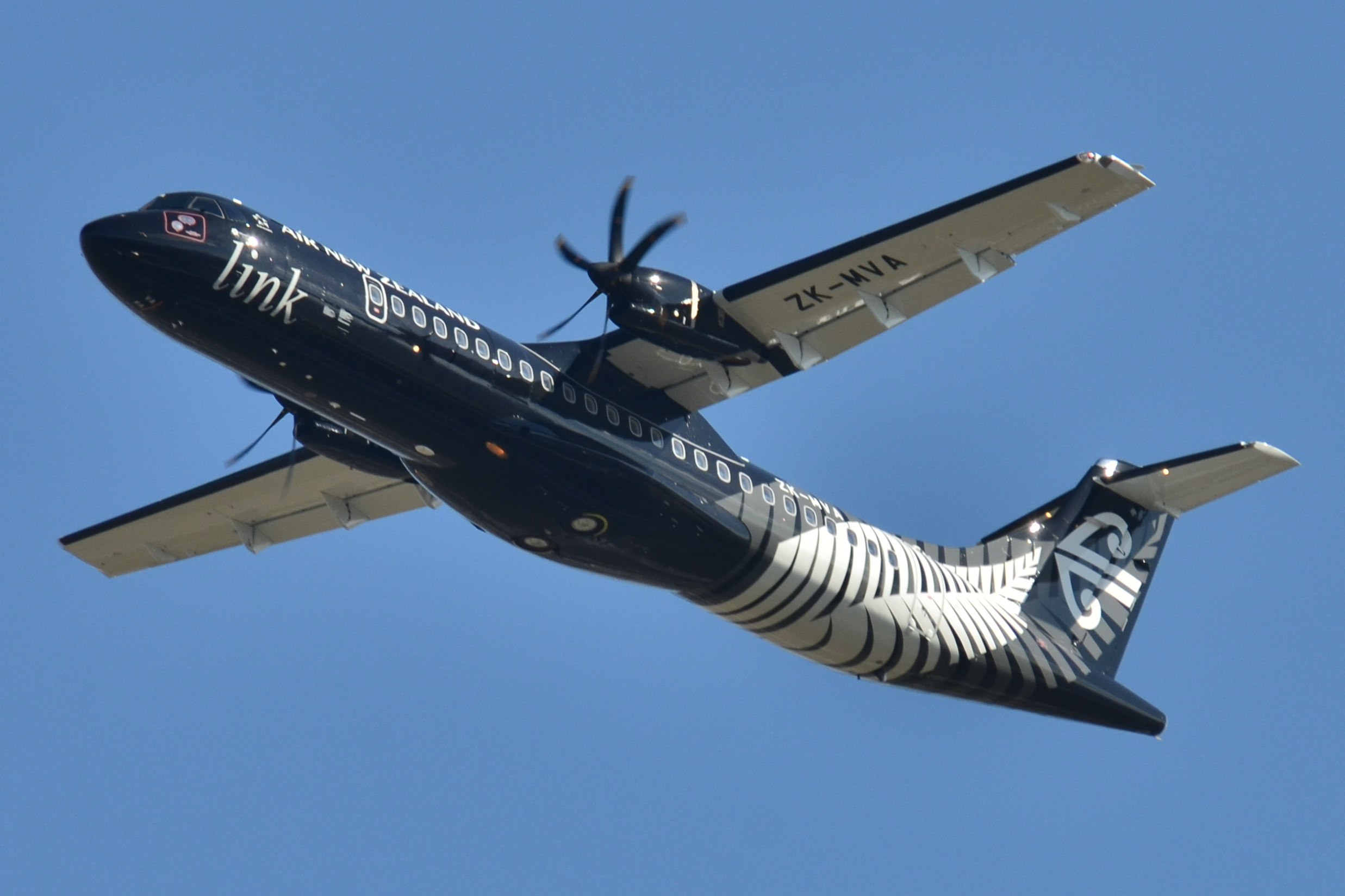 Photo prise à l'aéroport de Toulouse-Blagnac (LFBO) en France. Picture take at Toulouse-Blagnac Airport (LFBO) in France.